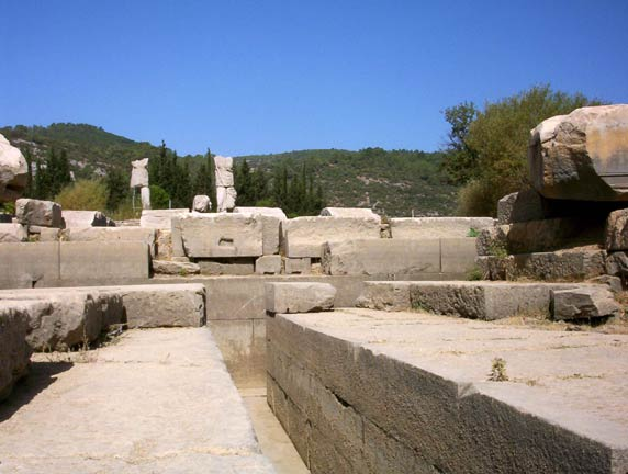 Klaros - GNU-FDL - selbst fotografiert